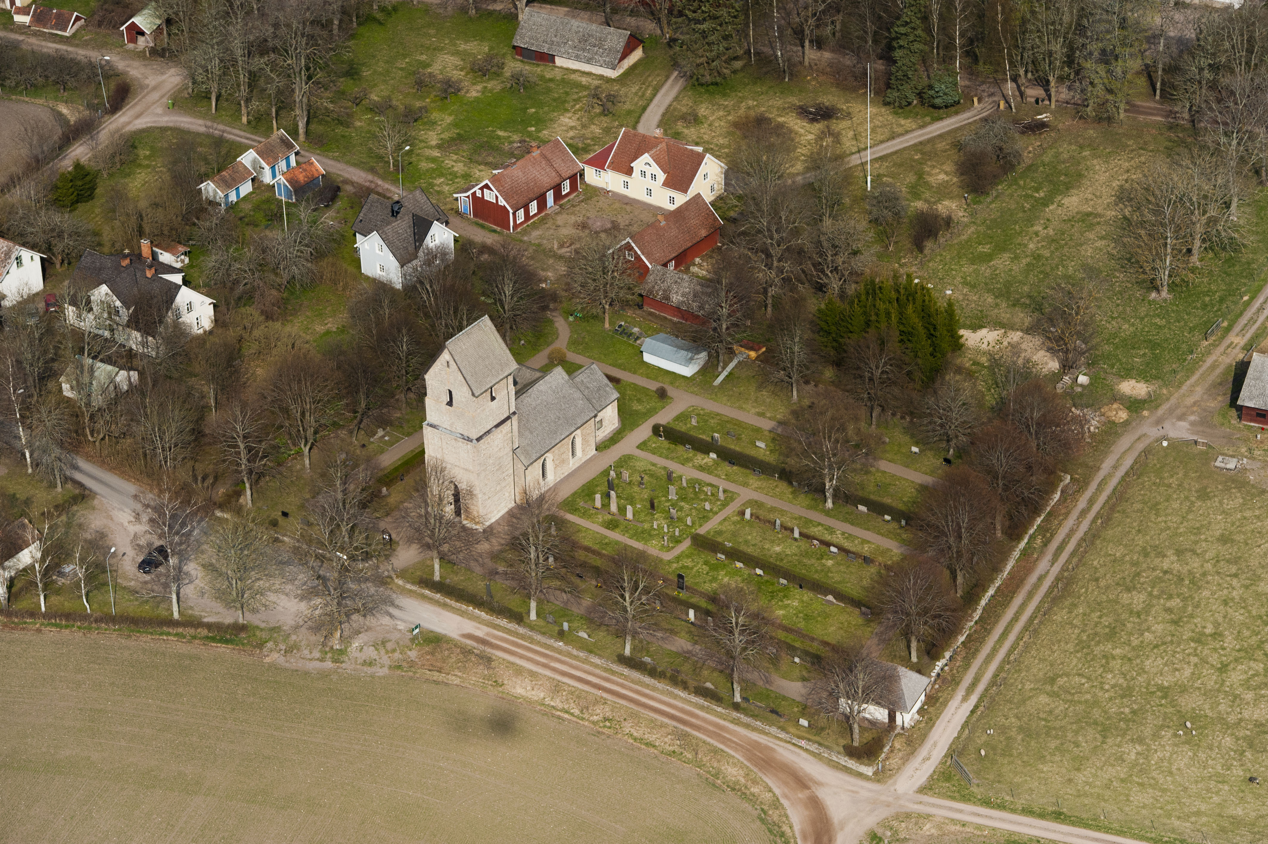 Herrestads ka